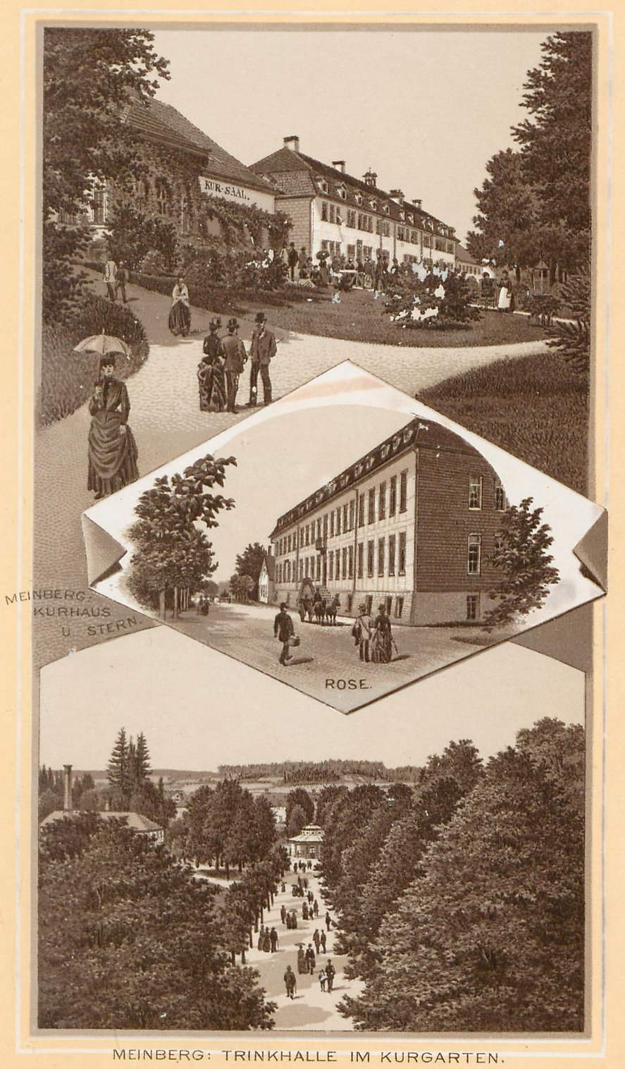 Bad Meinberg: Kurhaus, Logierhaus „Stern“, Kurgarten mit Trinkhalle und Logierhause „Rose“ um 1901